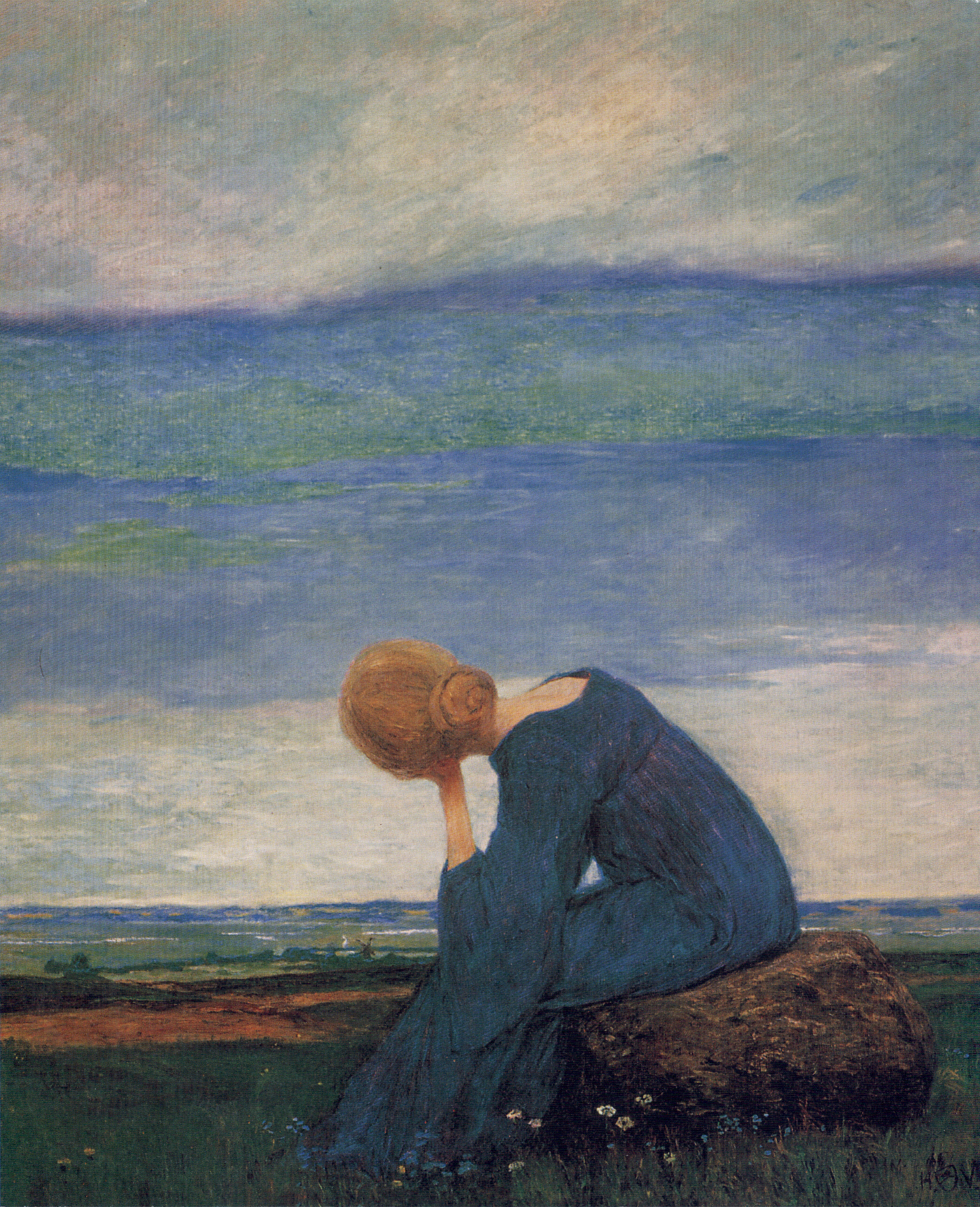 Sehnsucht (Träumerei). Öl auf Leinwand. Privatbesitz